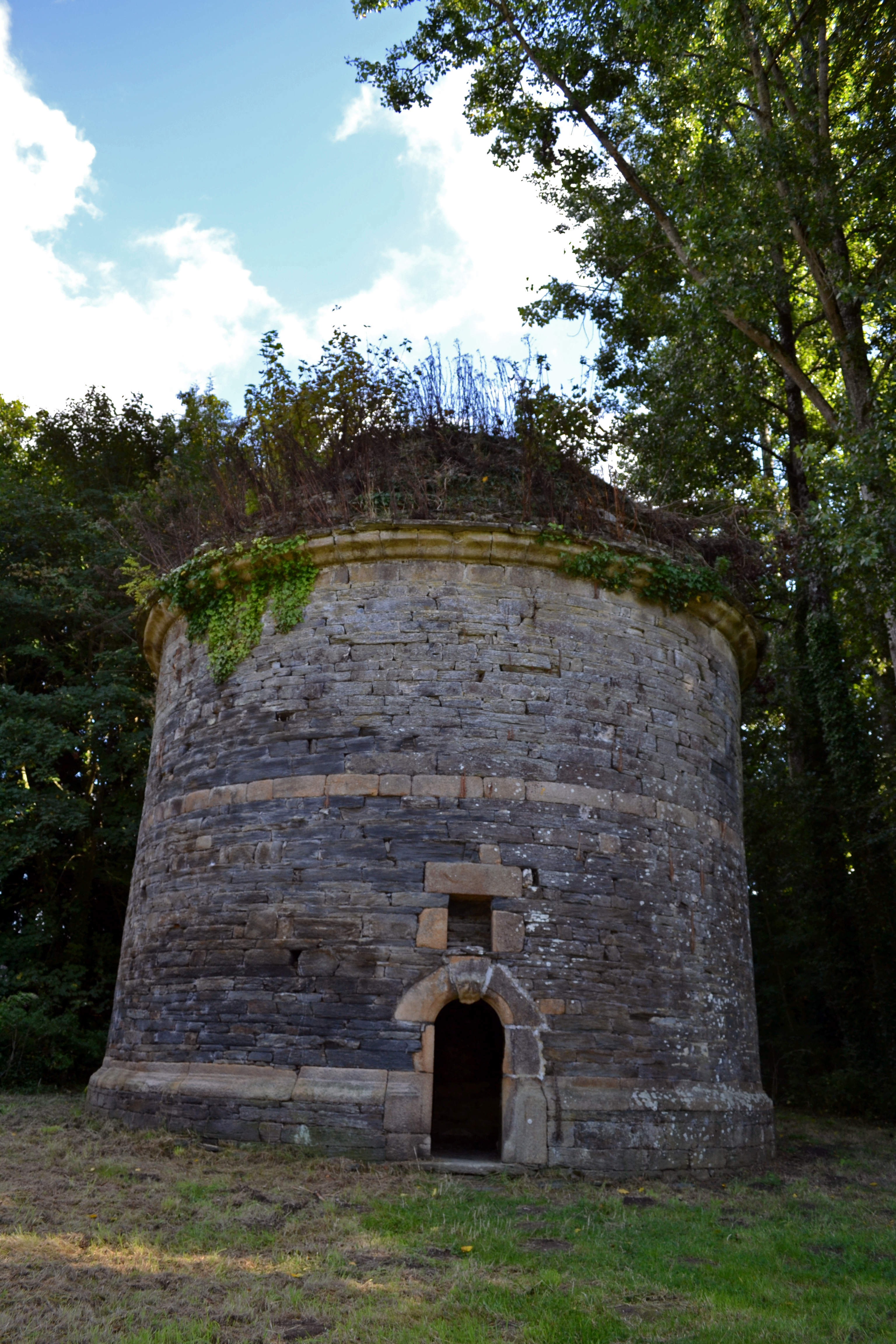 Pigeonnier du château de Kéranroux (XVIIIe siècle) à Ploujean (Morlaix, Finistère). .